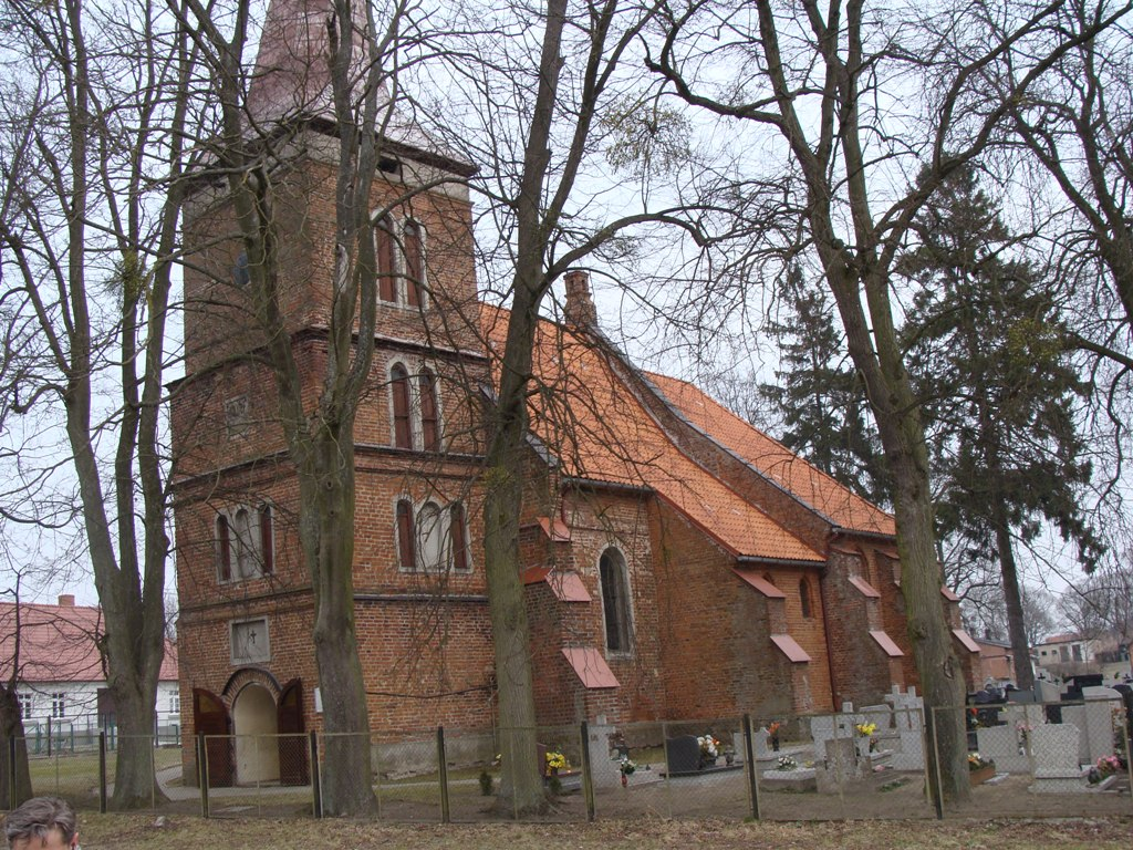 Kościół